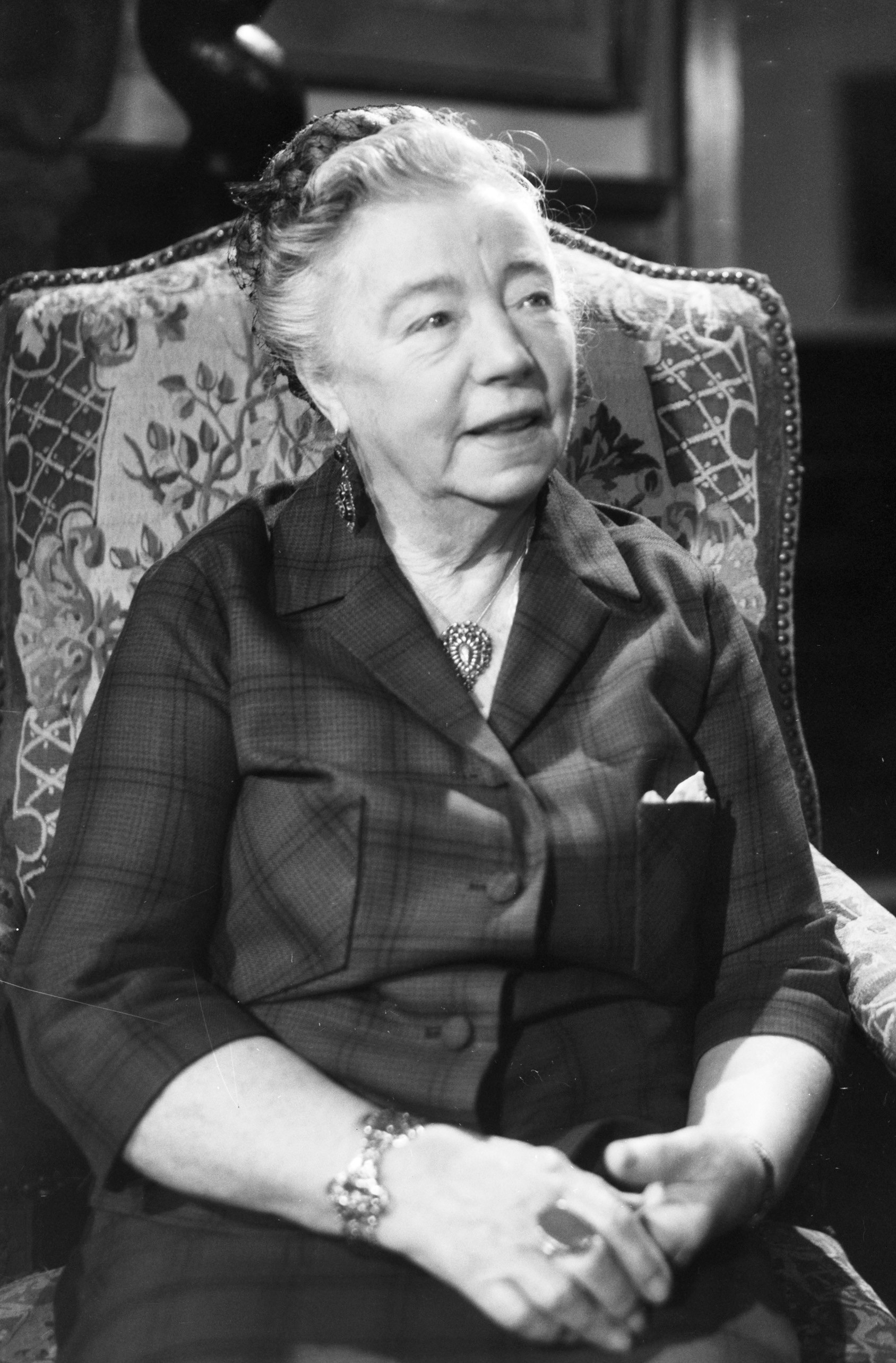 Actrice Aaf Bouber tijdens een interview met omroepster Elles Berger voor een televisie-uitzending